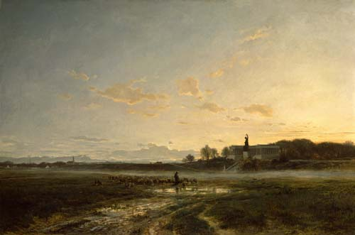 Die Theresienwiese gemalt von Adolf Heinrich Lier